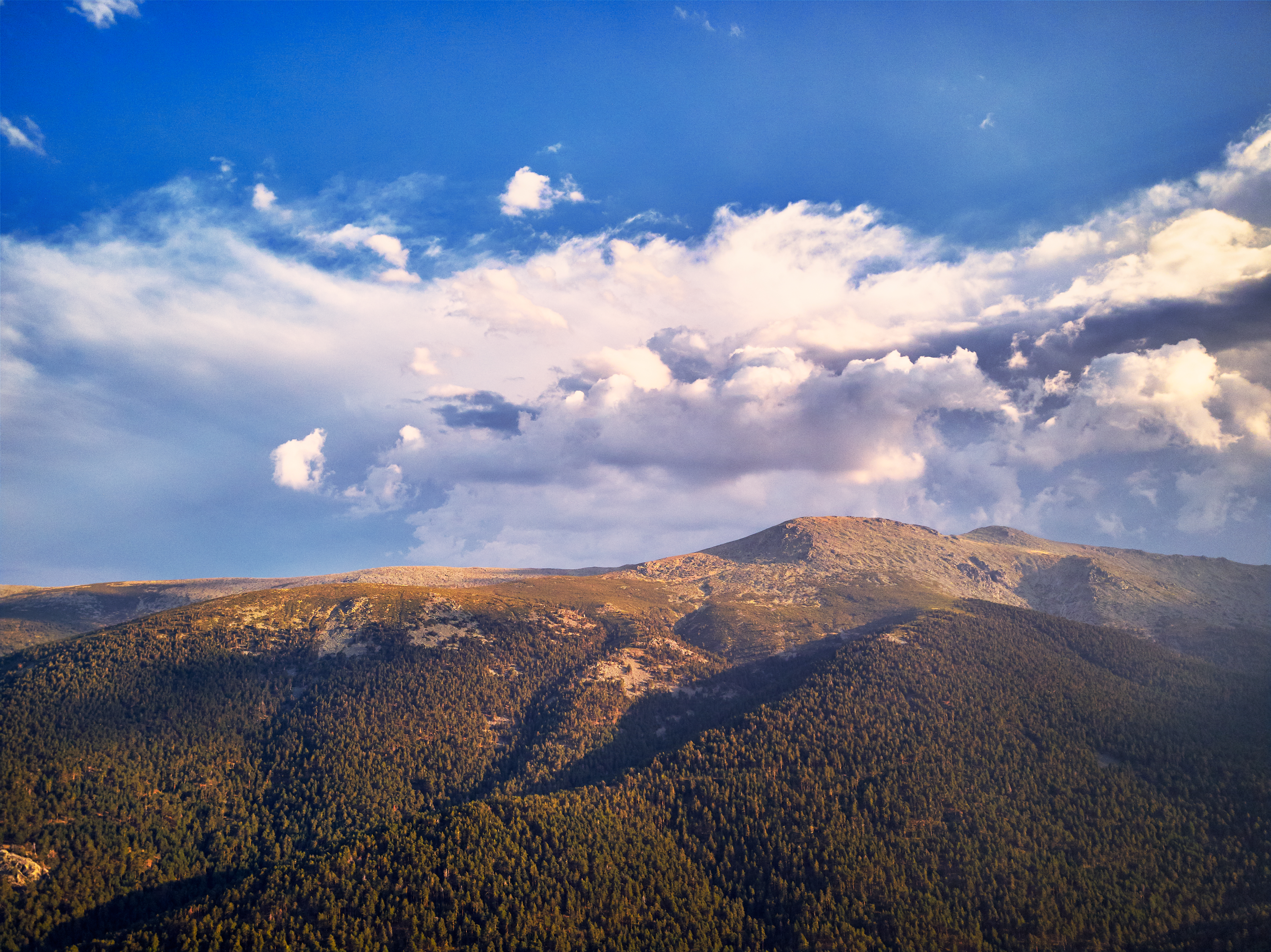 Rascafria